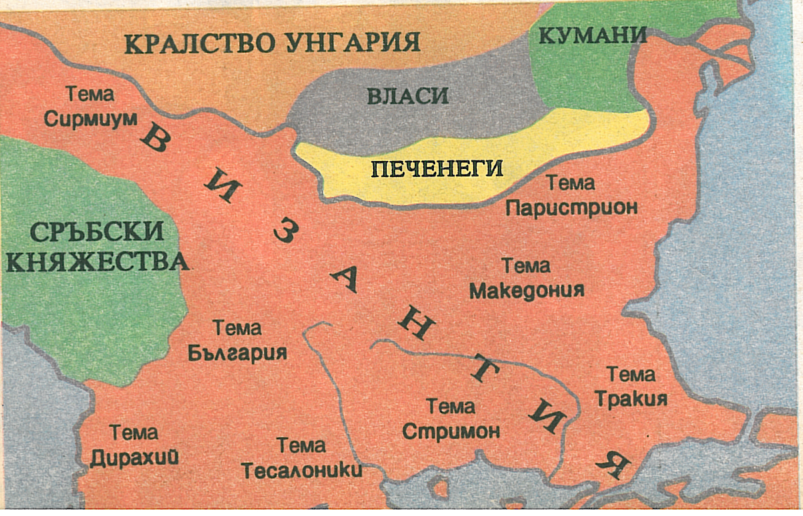 Византийските теми в България (Byzantian thems in Bulgaria)